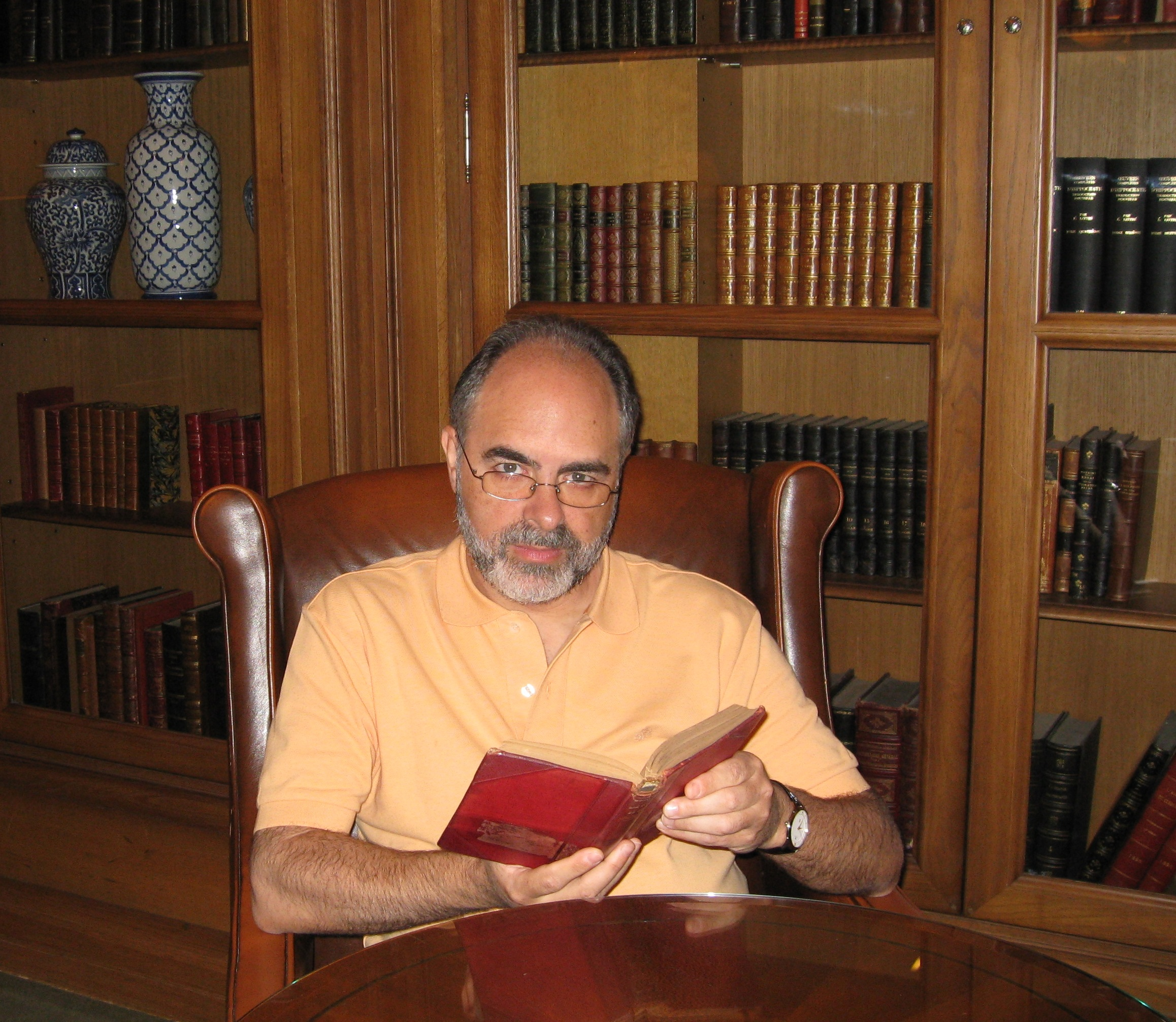 Antonio del Camino. Poeta